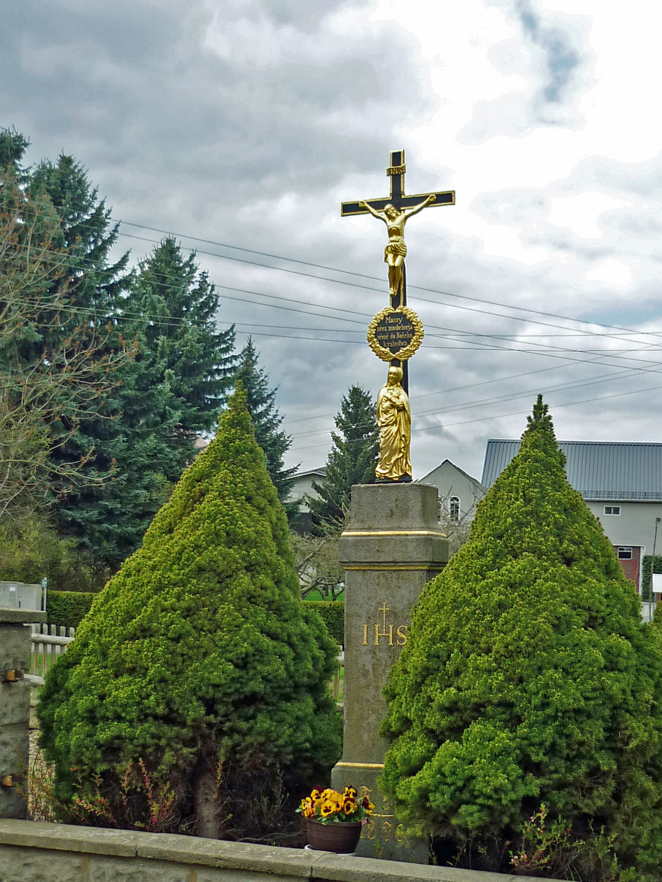 Wegkreuz in Neudörfel (Räckelwitz), Horkaer Straße Nr.11 Hornjoserbsce: Swjaty křiž w Nowej Wjesce při Hórčanskej čo. 11